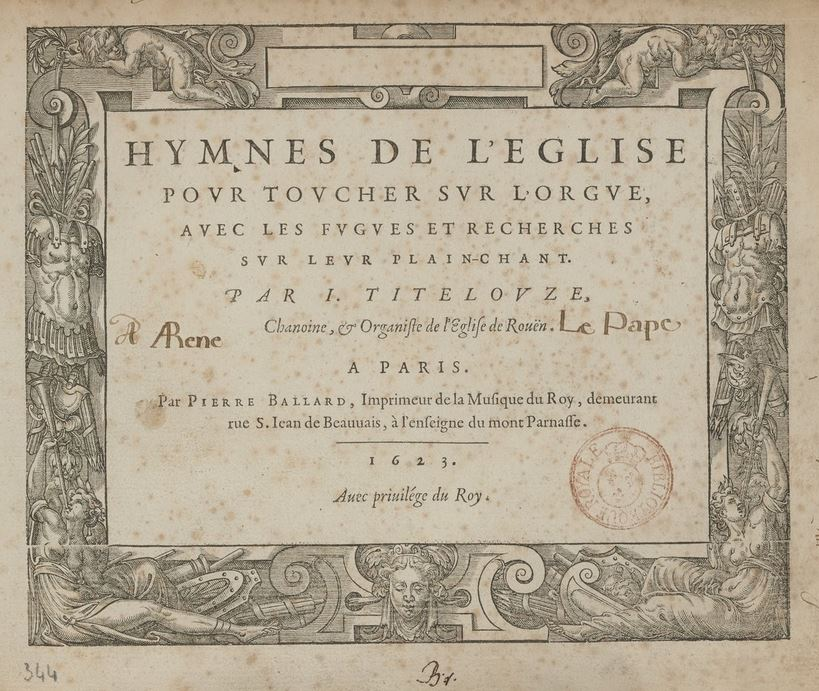 Title page of Jehan Titelouze Hymnes (Paris, 1623) (Paris BSG)